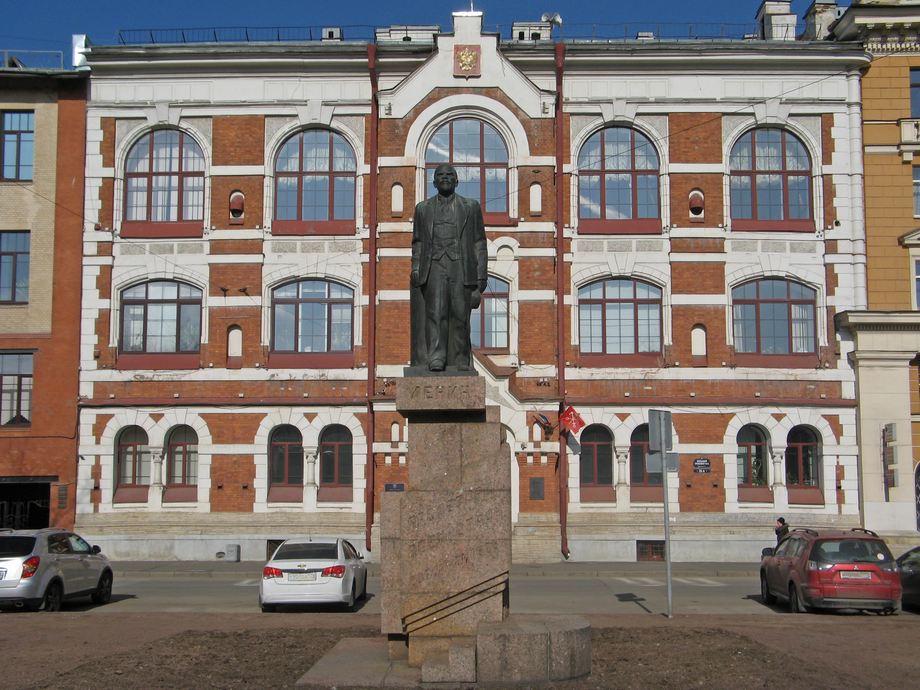 Памятник В.И. Ленину: Большой проспект Васильевского острова, у дома 55, Василеостровский район, Санкт-Петербург